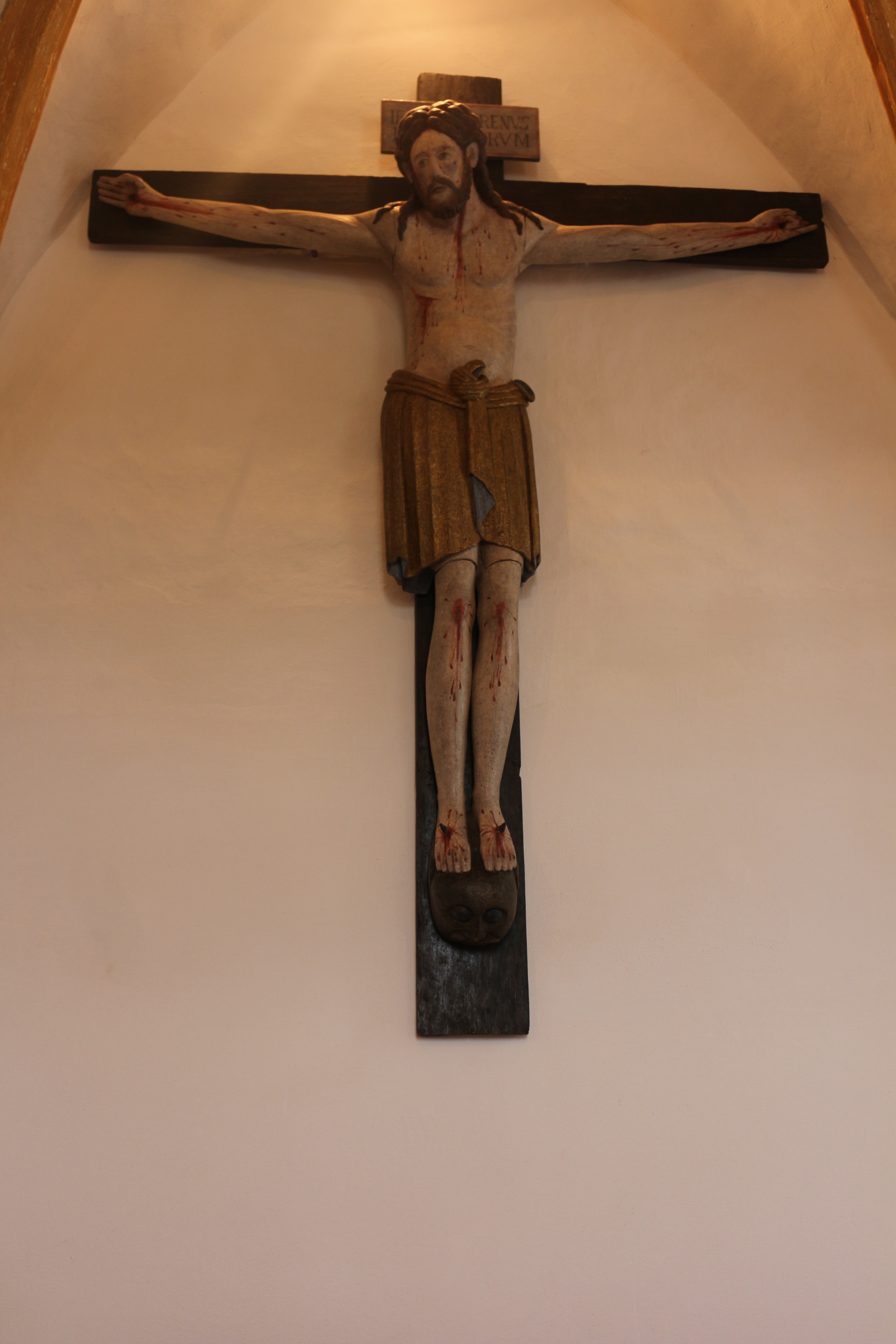 Enghausener Kreuz aus dem 9./10. Jahrhundert